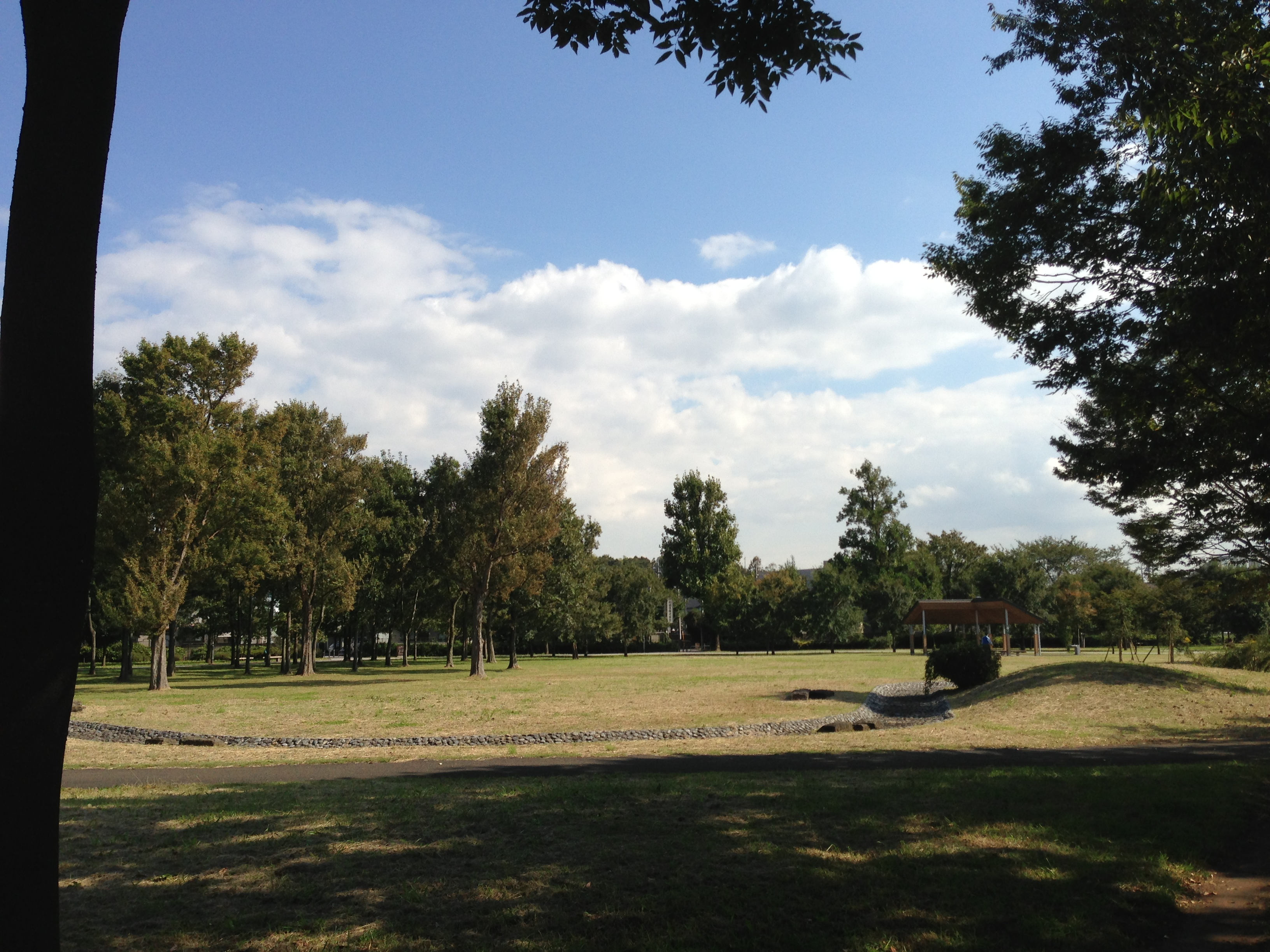 6 Chome-11 Ōsawa, Mitaka-shi, Tōkyō-to 181-0015, Japan